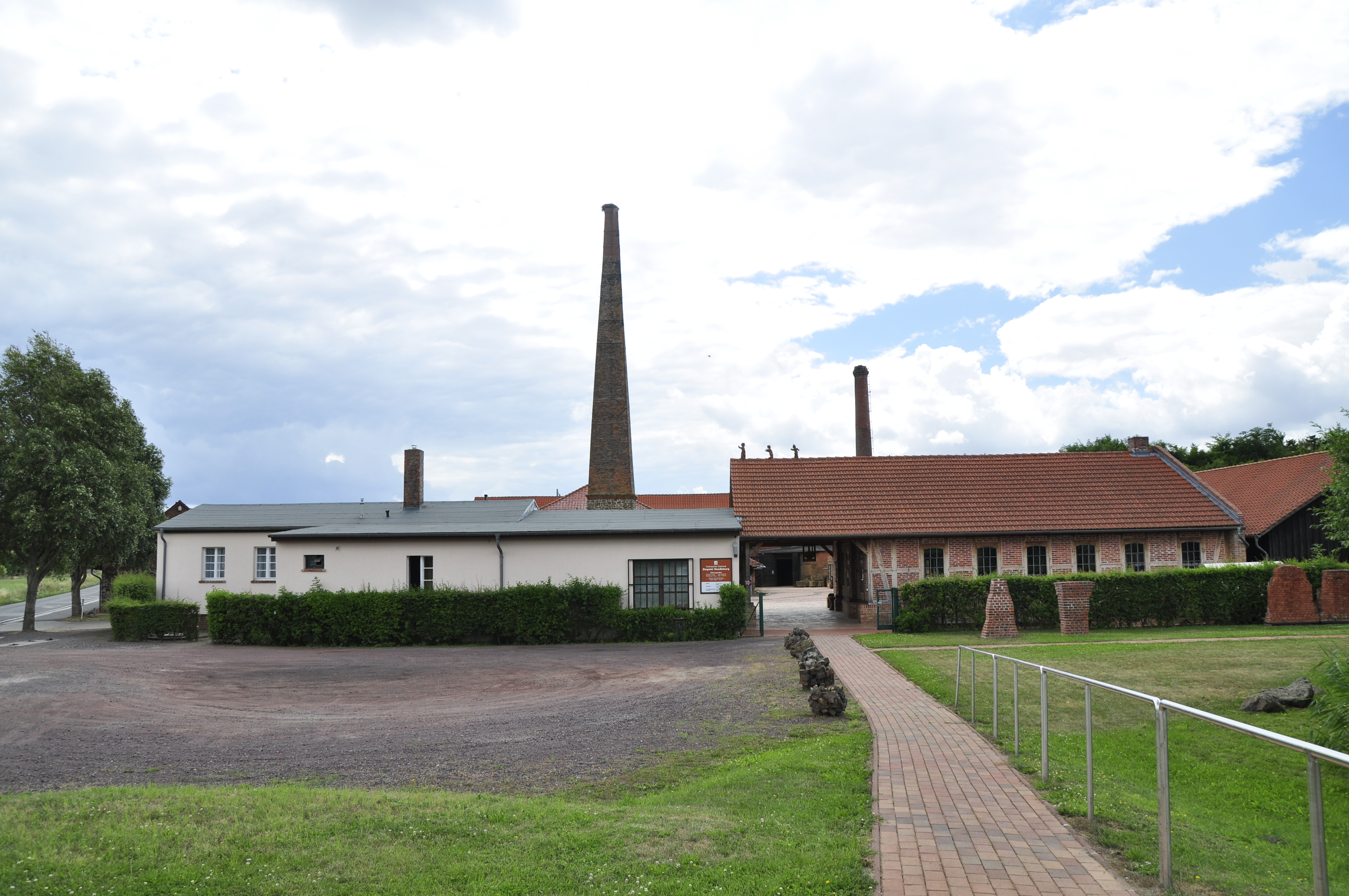 Ziegelei Hundisburg